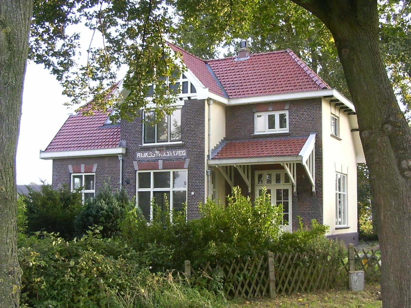 Voormalige halte Haarlem Rijksstraatweg